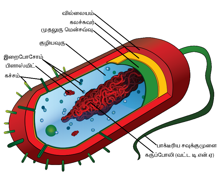 கிராம்-நேர் பாக்டீரியா ஒன்றின் கலக்கட்டமைப்பு